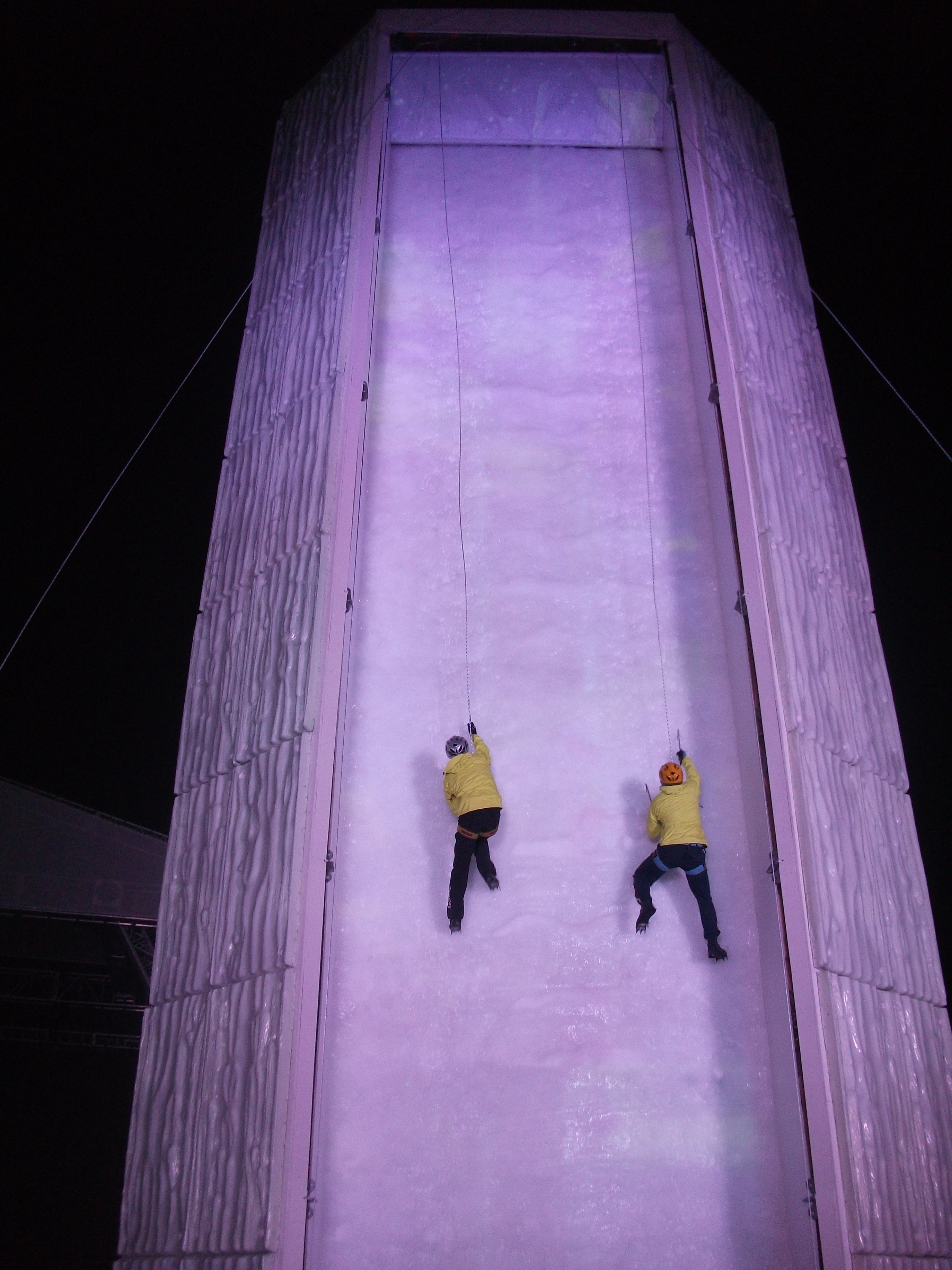 Презентация ледолазания в Олимпийском парке Сочи на XXII Зимних Олимпийских играх